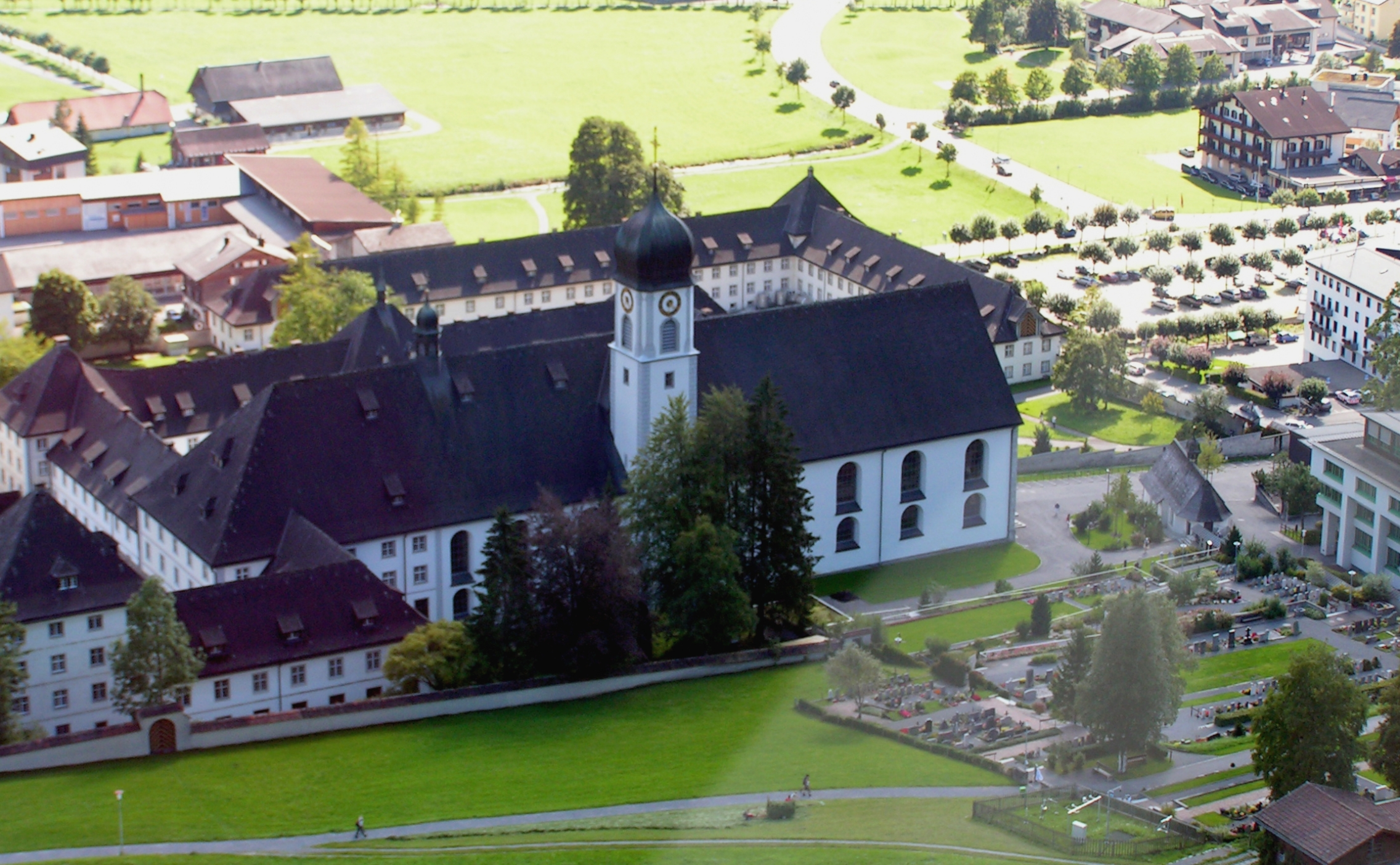 Kloster Engelberg. Vue depis la cabine du téléphérique du Ristis.